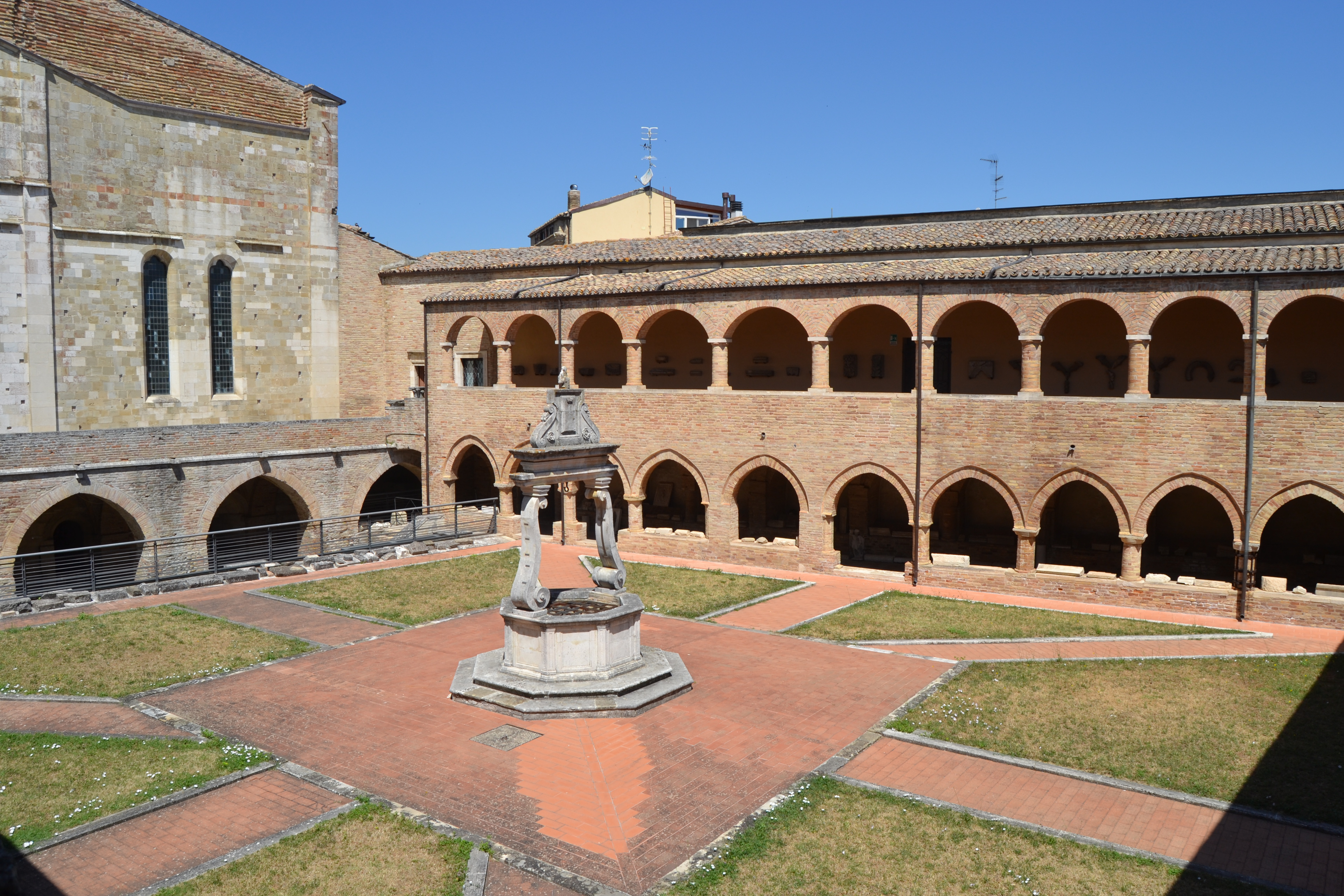 Concattedrale di Atri, chiostro (oggi adibito a Museo Capitolare)